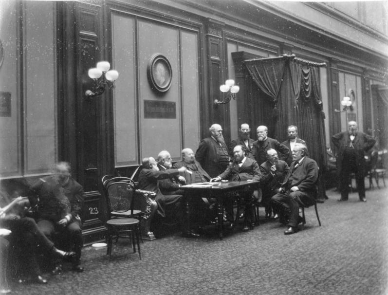 Title: Reichstag, Deutsche Freisinnige Gruppe Extra information: Aufnahme aus dem Fotoalbum "Der Deutsche Reichstag und sein Heim"Mitglieder der Deutsch-Freisinnigen ParteiBild 116/121 People in the image: Nickel, Johann Heinrich: Reichstagsabgeordneter der Deutsch-Freisinnigen Partei, Deutschland (GND 133289958) Factual corrections and alternative descriptions are encouraged separately from the original description. Additionally errors can be reported at this page to inform the Bundesarchiv. Original historic description: Deutsche Freisinnige Gruppe II Dr. Vierchow. Nickel. Richter. Dr. Hermes. Dr. Witte Dr. Hänel. Münch. Dr. Bulle Dr. Langerhans. Frhr. v. Unruhe-Bomst.